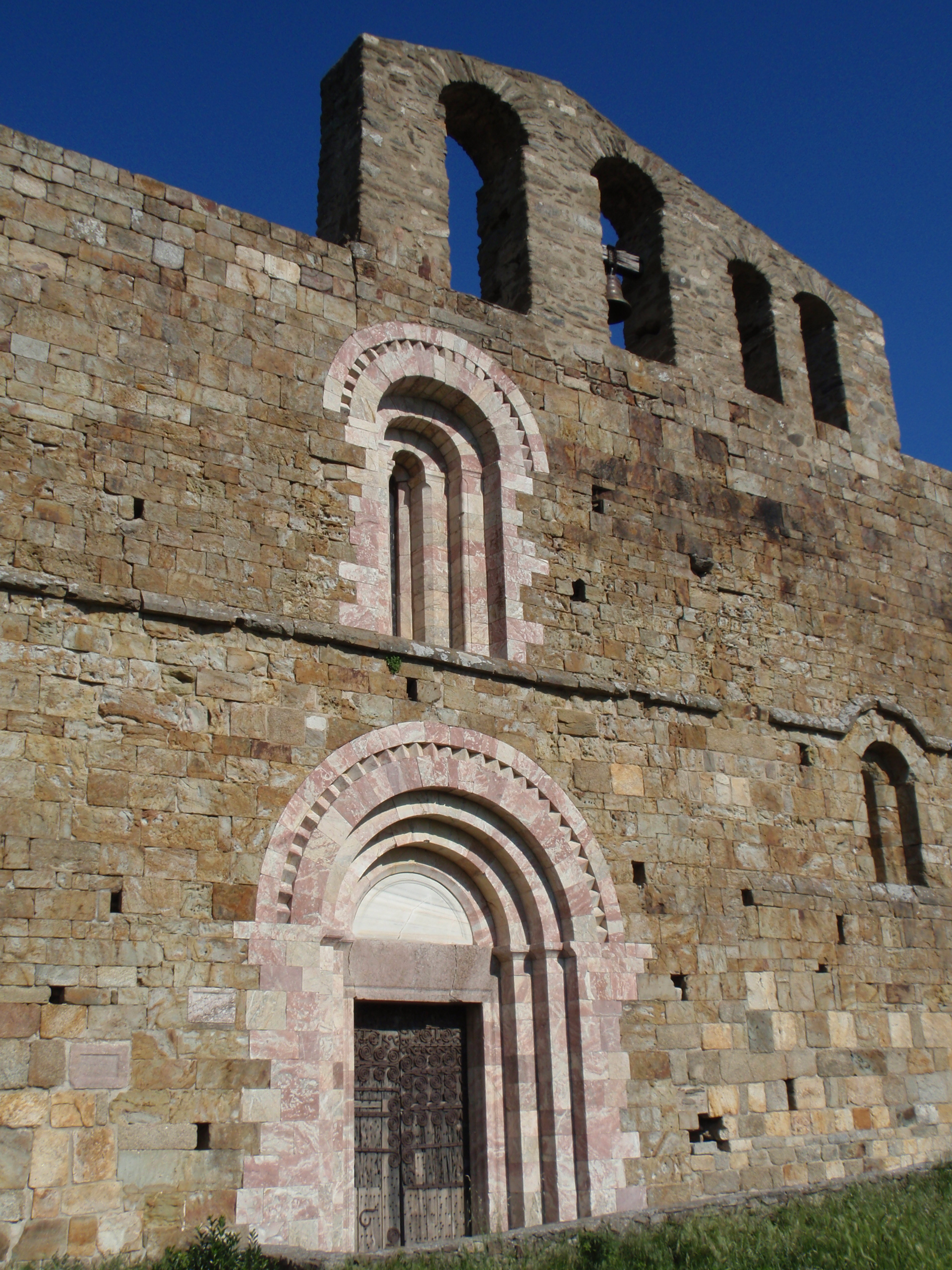 Priorat de Marcèvol (Arboçols) .